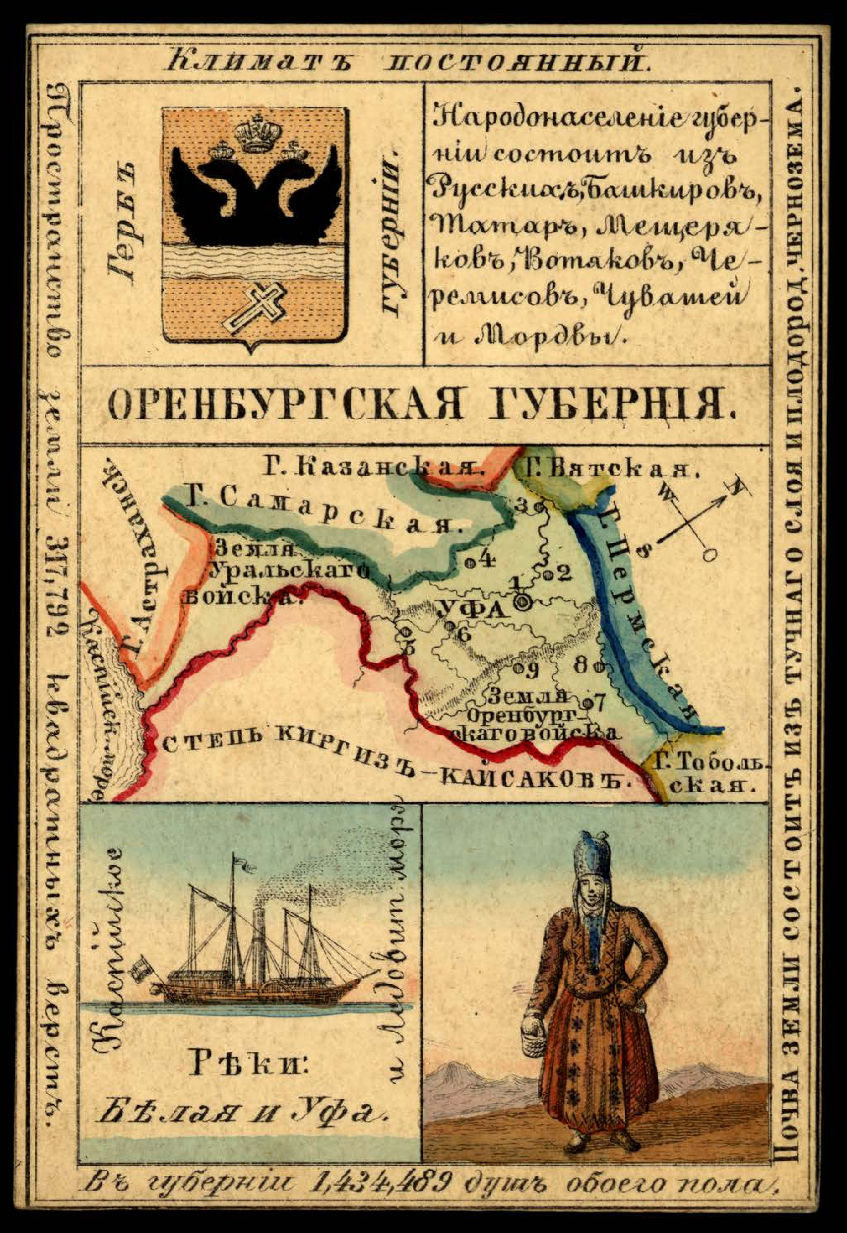 Карточка из набора географических карточек Российской Империи